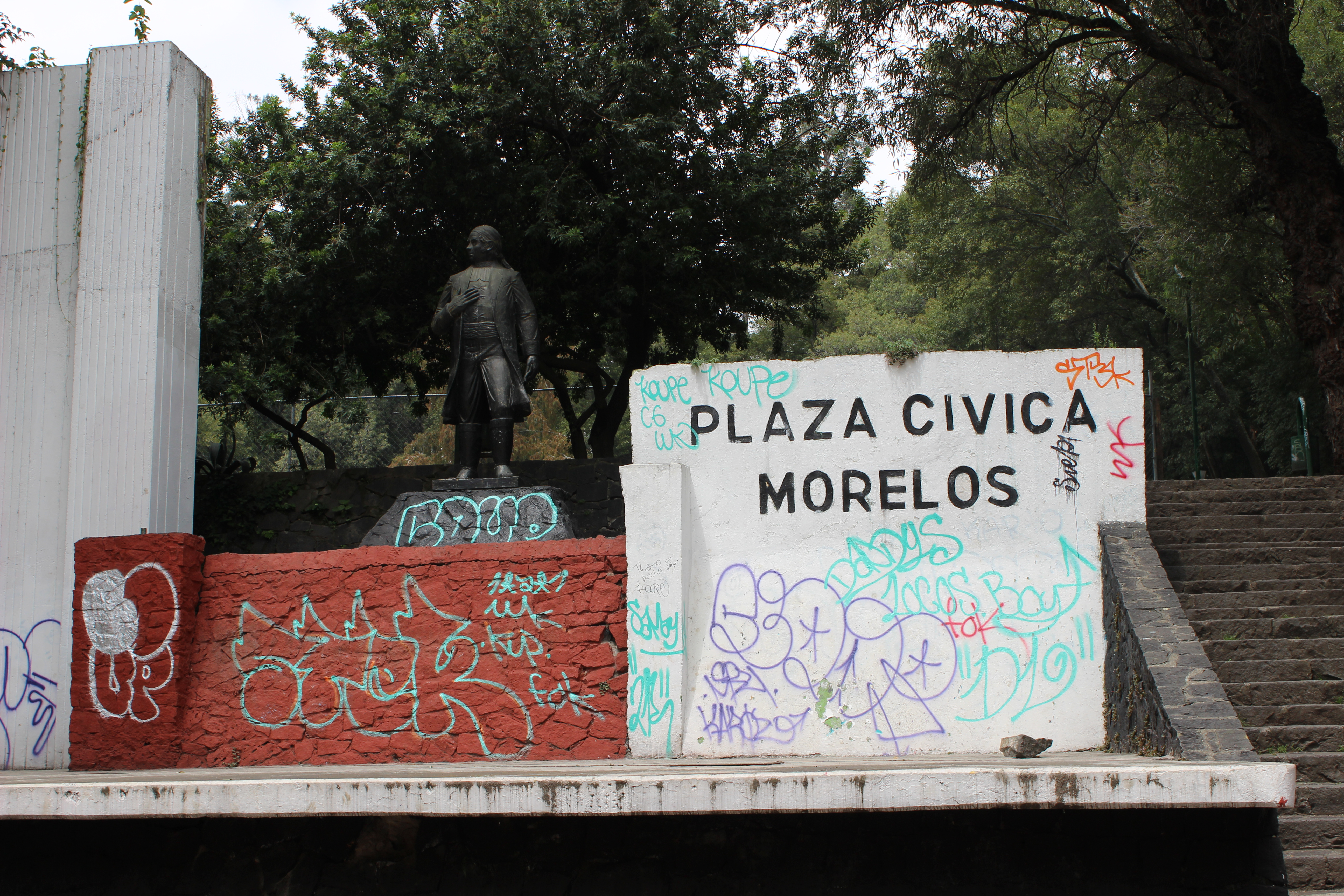 Vista de la placa de la Plaza cívica Morelos y de la estatua de José María Morelos y Pavón en el Parque Fuentes Brotantes. La placa tiene grafitis al igual que la base de la estatua. A la derecha están unas escaleras de piedra.